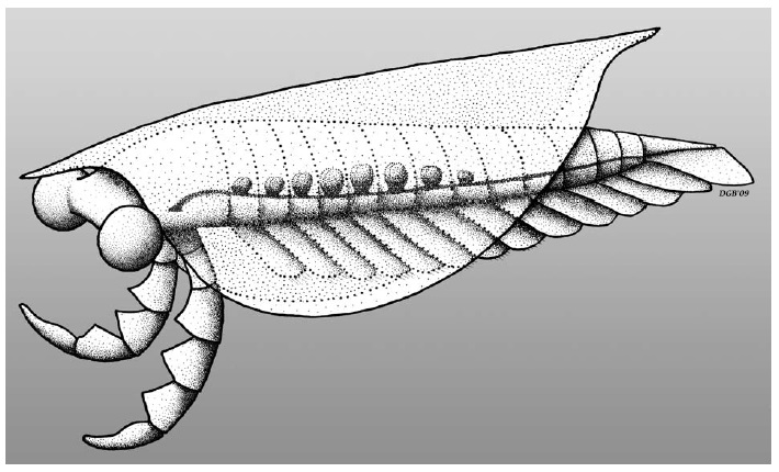 Reconstruction of the bivalved arthropod Isoxys acutangulus (Walcott, 1908), swimming in the water column. Note that the position of the mouth and the attachments of the appendages to the body are conjectural. Not to scale.